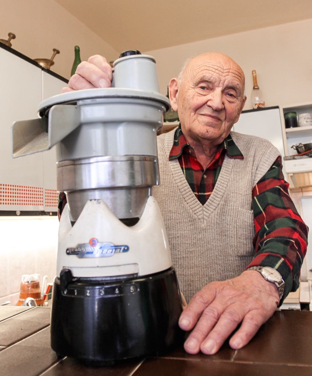 Designér Stanislav Lachman u jednoho ze svých realizovaných návrhů - mixéru ETA.